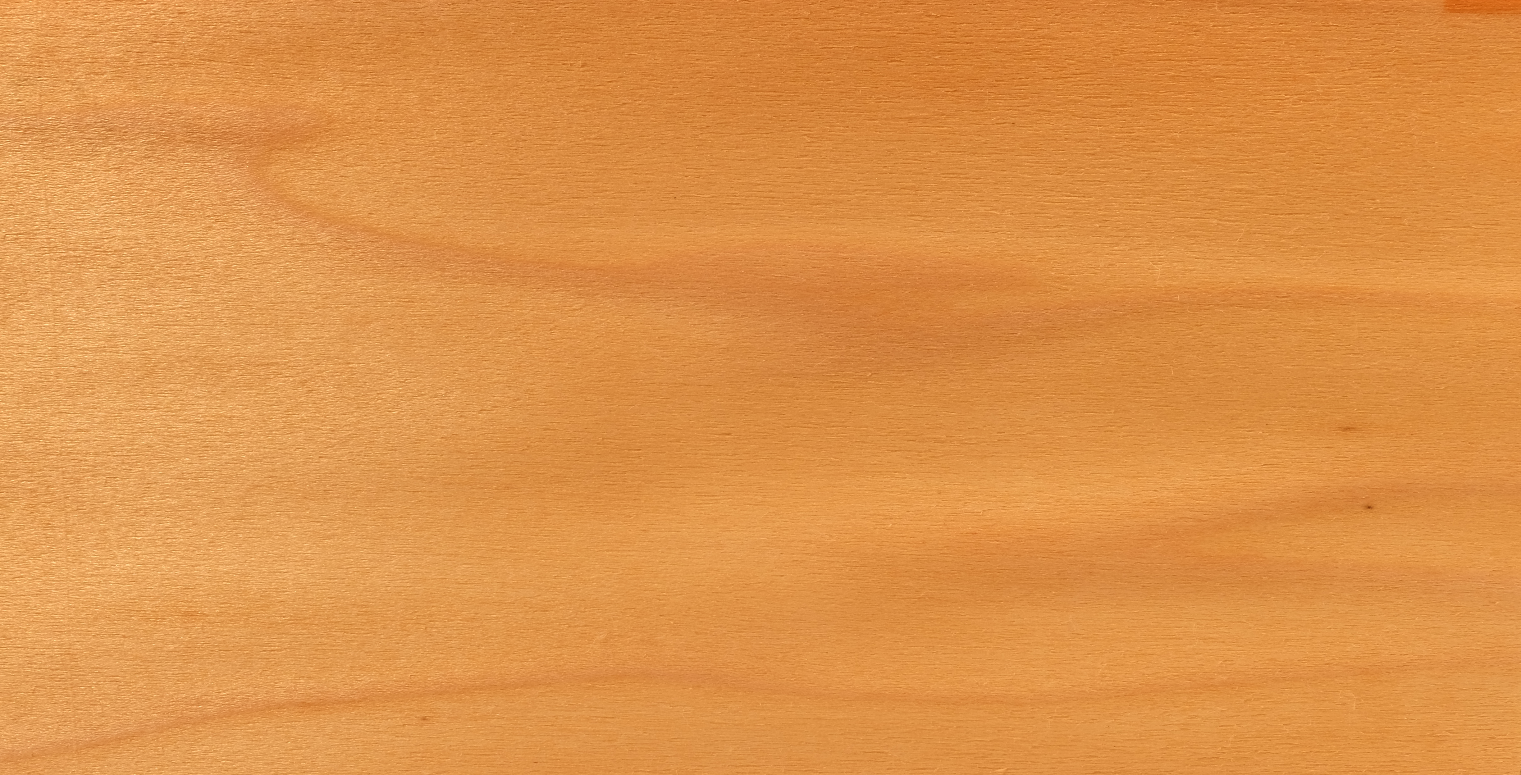 gemessertes Furnier; Holzart: WIW, Whitewood, Tulpenbaum, Yellow poplar